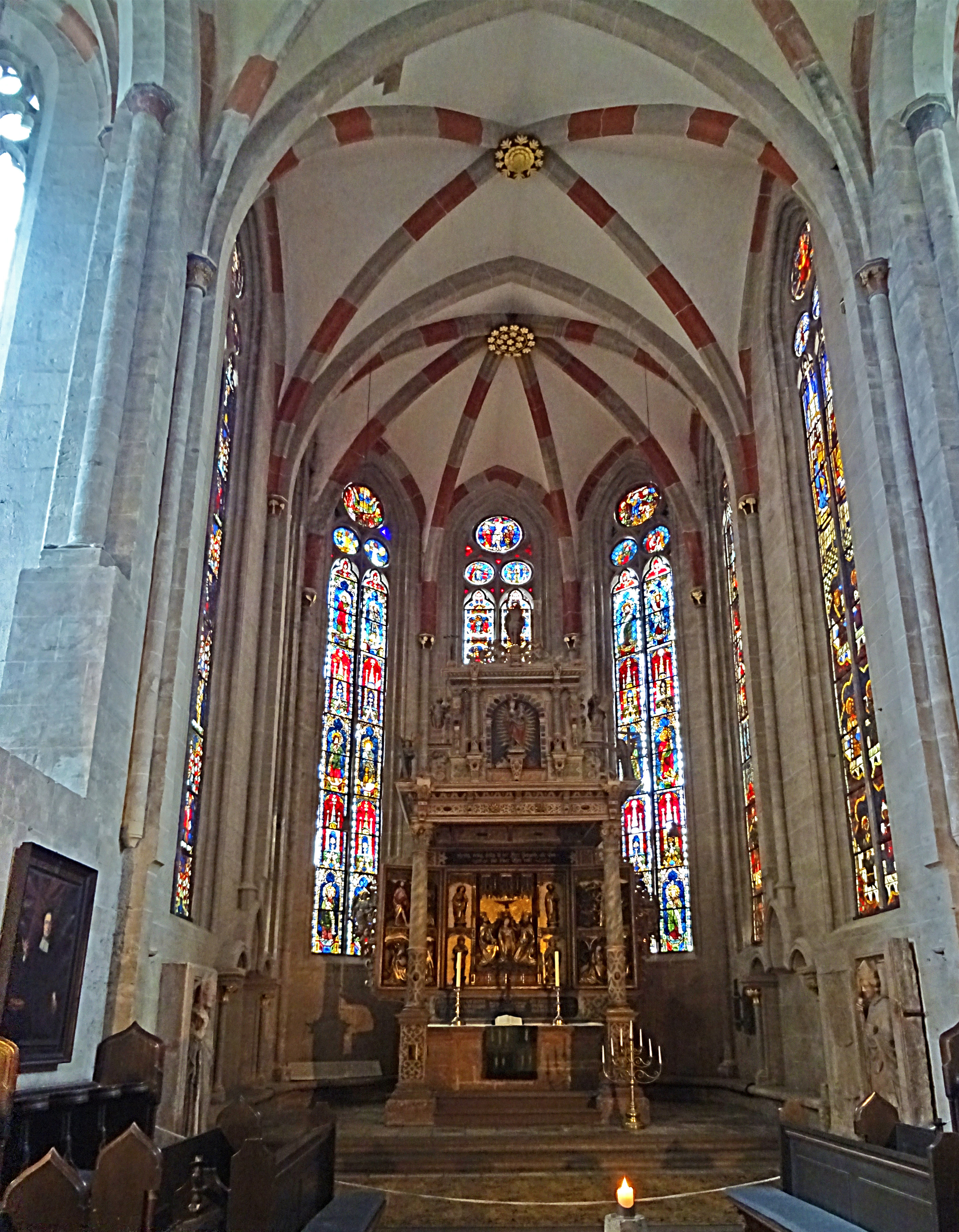 Chor der Divi-Blasii-Kirche (Mühlhausen, Thüringen)